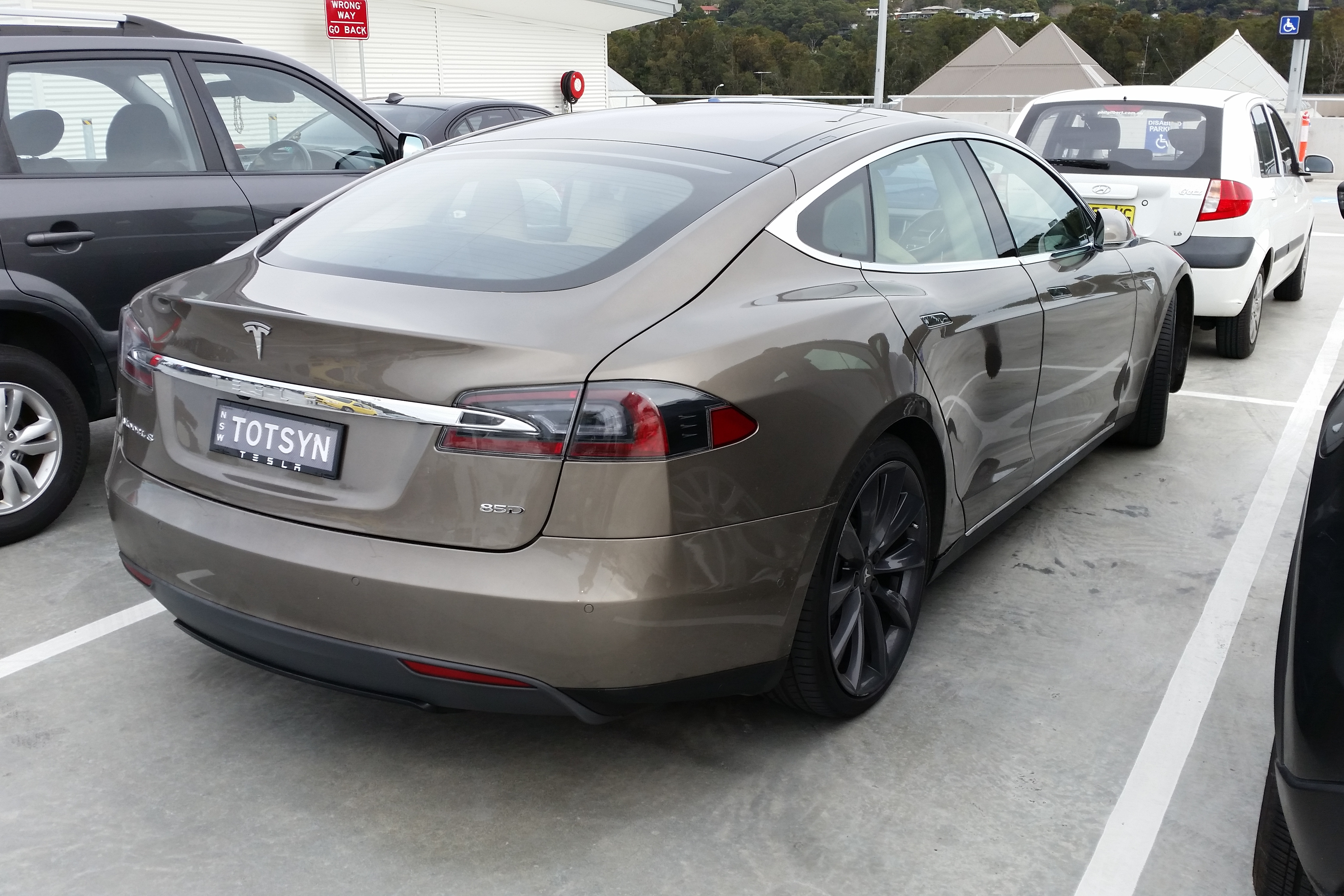 Tesla Model S 85D